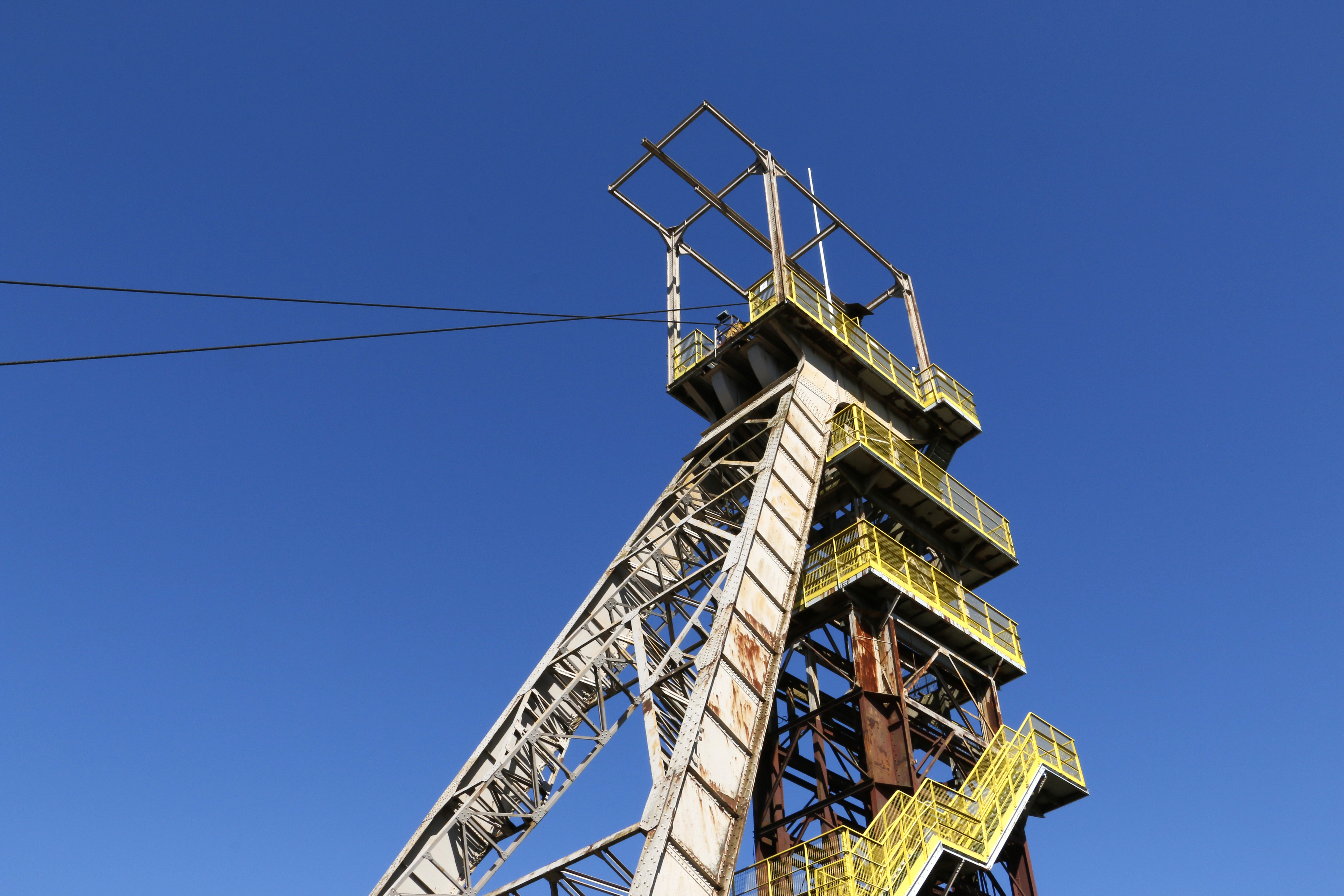 Aumetz (57). Chevalement de mine